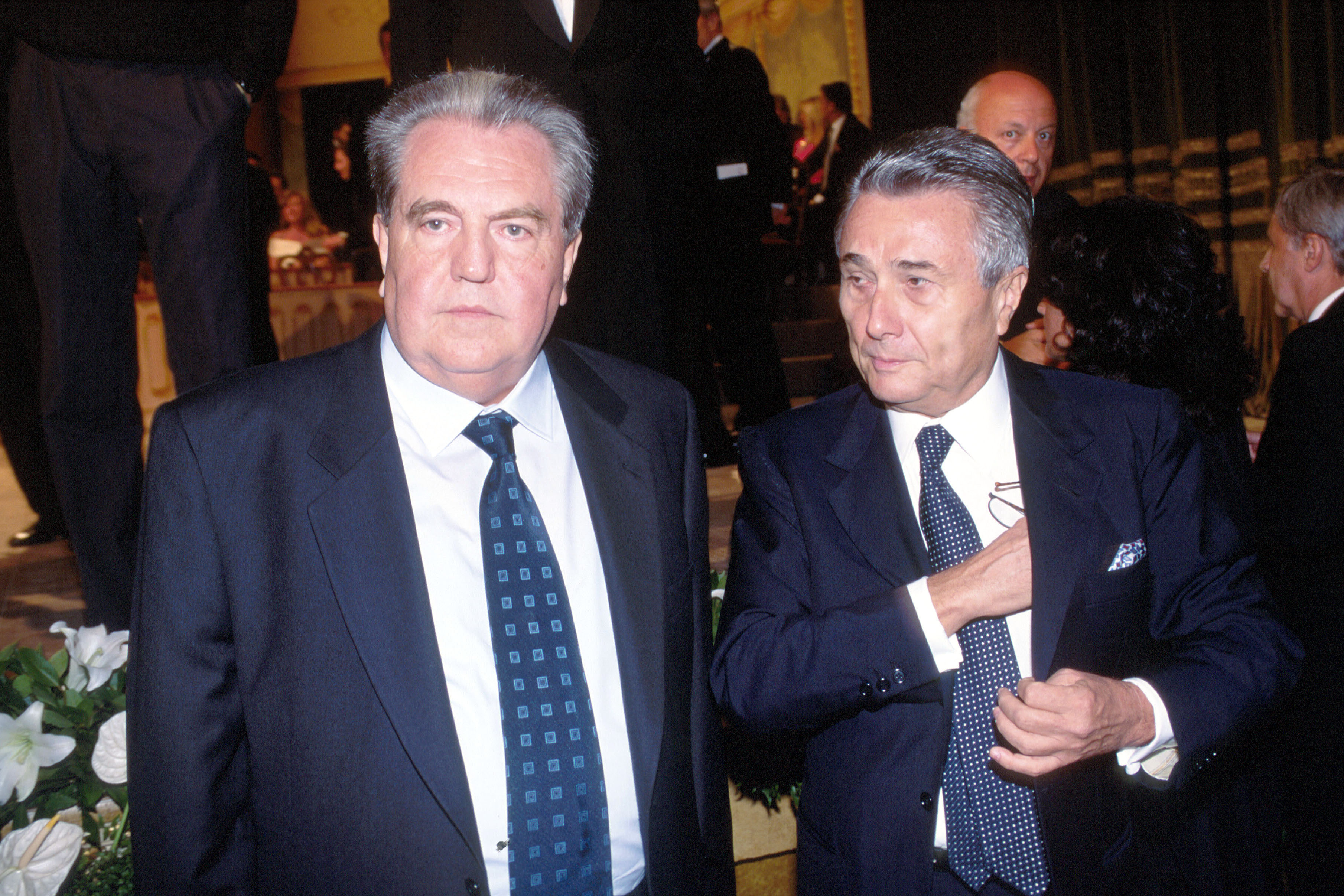 Lo scrittore Giuseppe Pontiggia con Alberto Arbasino al Campiello del 1994